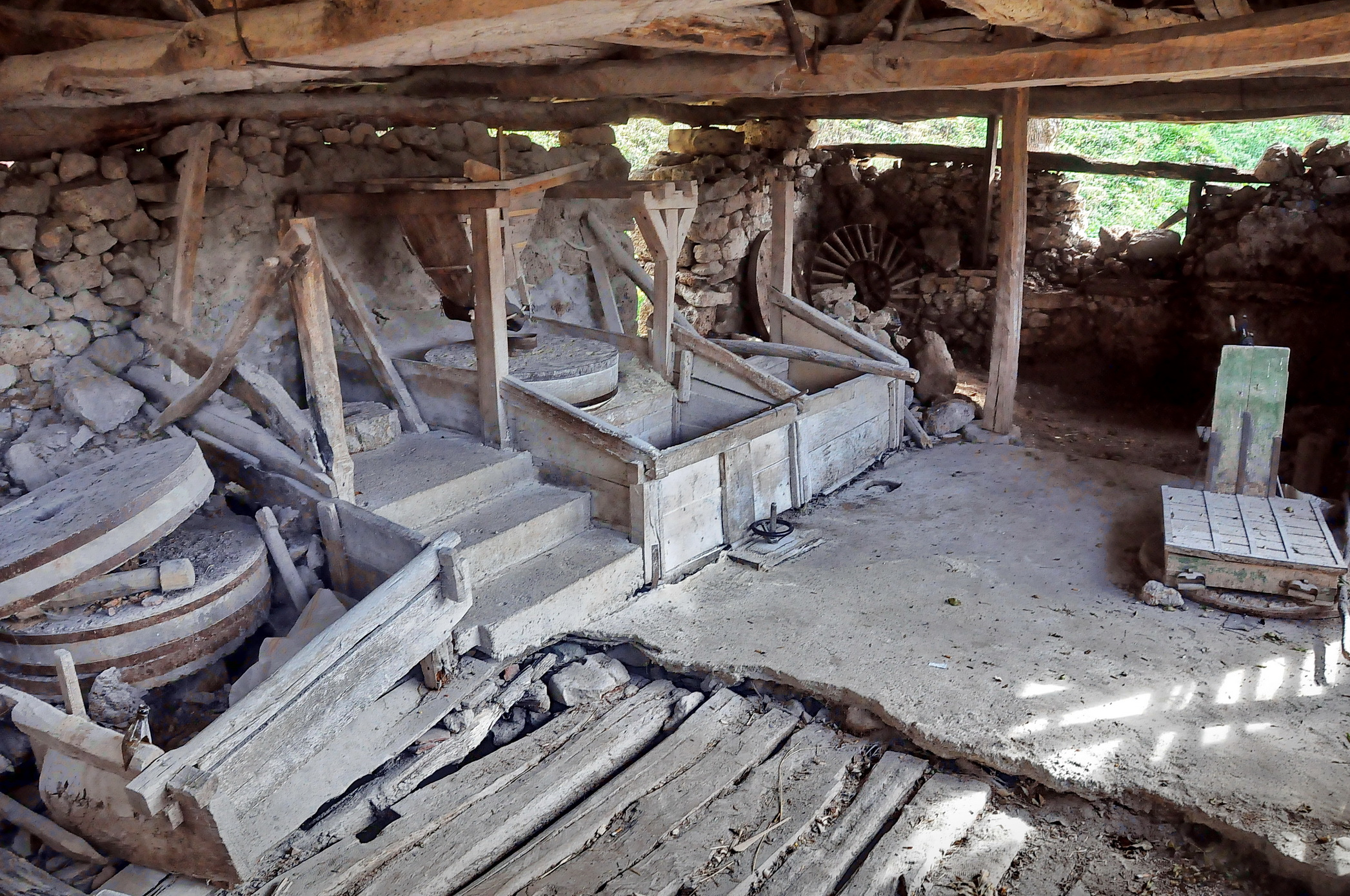 Srpski (latinica): Vodenica na potoku u Gornjem Dušniku (Suva planina)